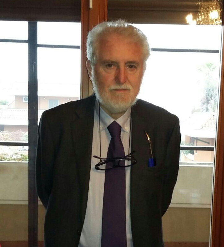 Prof. Emerito Vncenzo Ferrari